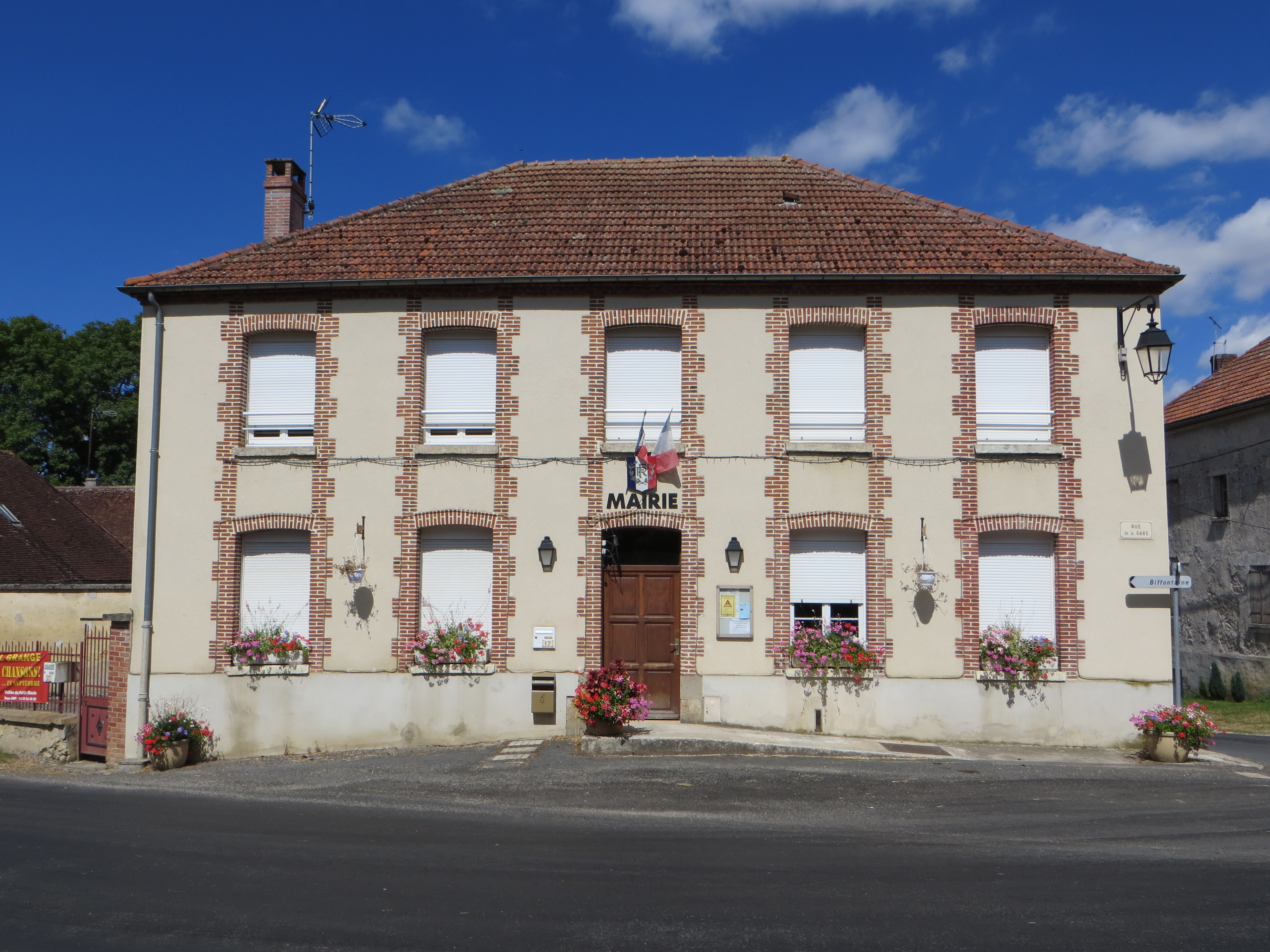 Mairie de la commune